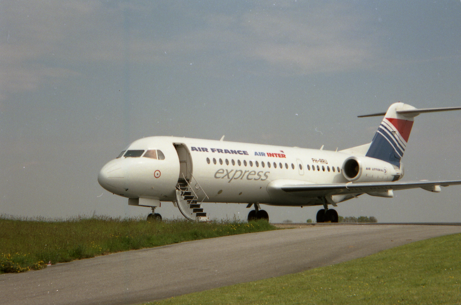 Air France / Air Inter Fokker 70 sur le parking de l'aéroport de Quimper-Cornouaille